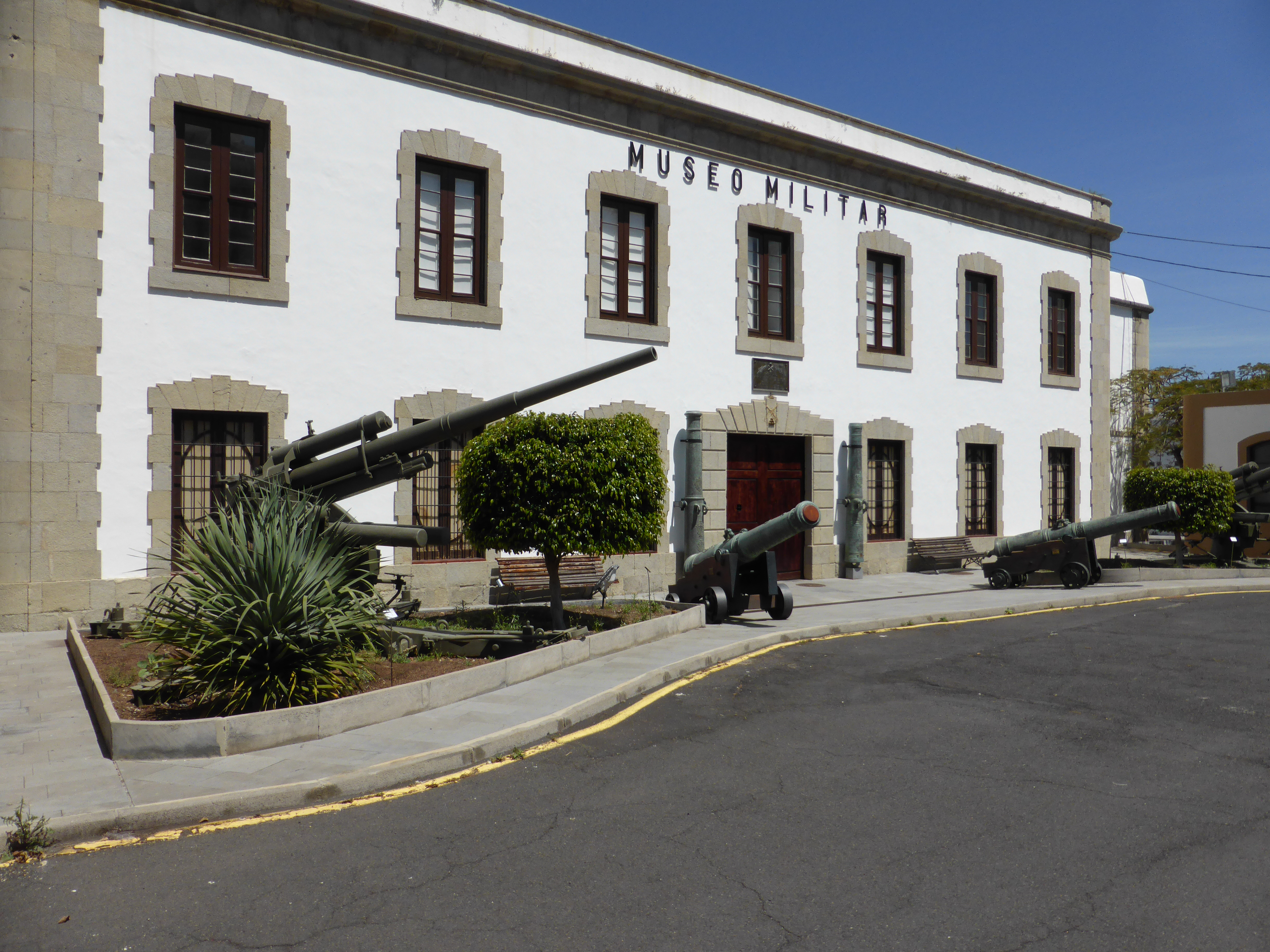 El antiguo Fuerte de Almeyda (o Almeida), en Santa Cruz de Tenerife, es actualmente la sede del "Museo Histórico Militar de Canarias". Se encuentra en la calle de San Isidro, al final de la Rambla de Santa Cruz. Fue levantado en el siglo XIX.